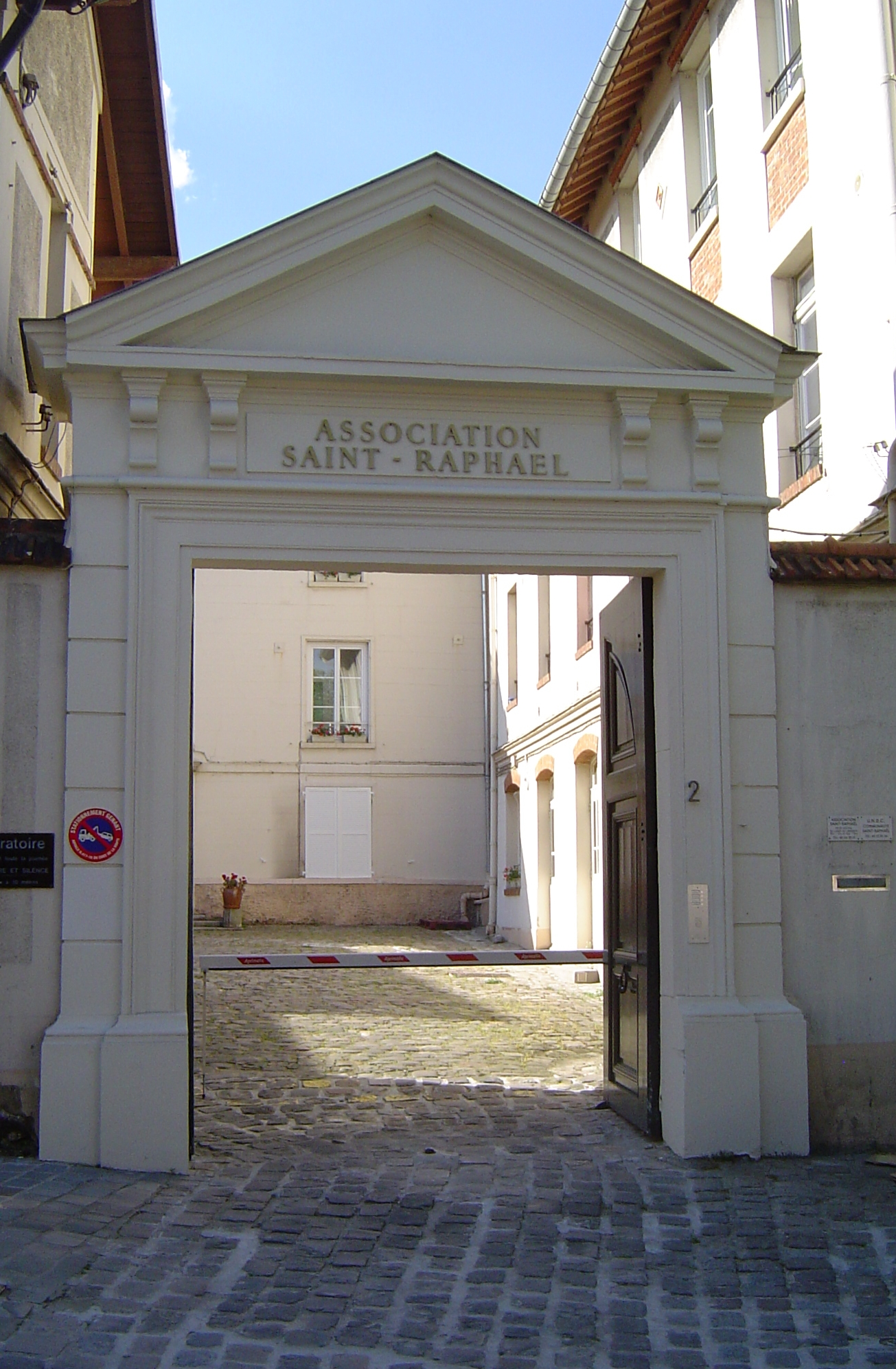 Antony